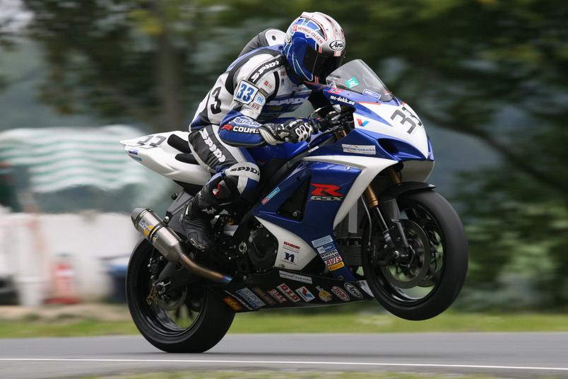 Carl Berthelsen.